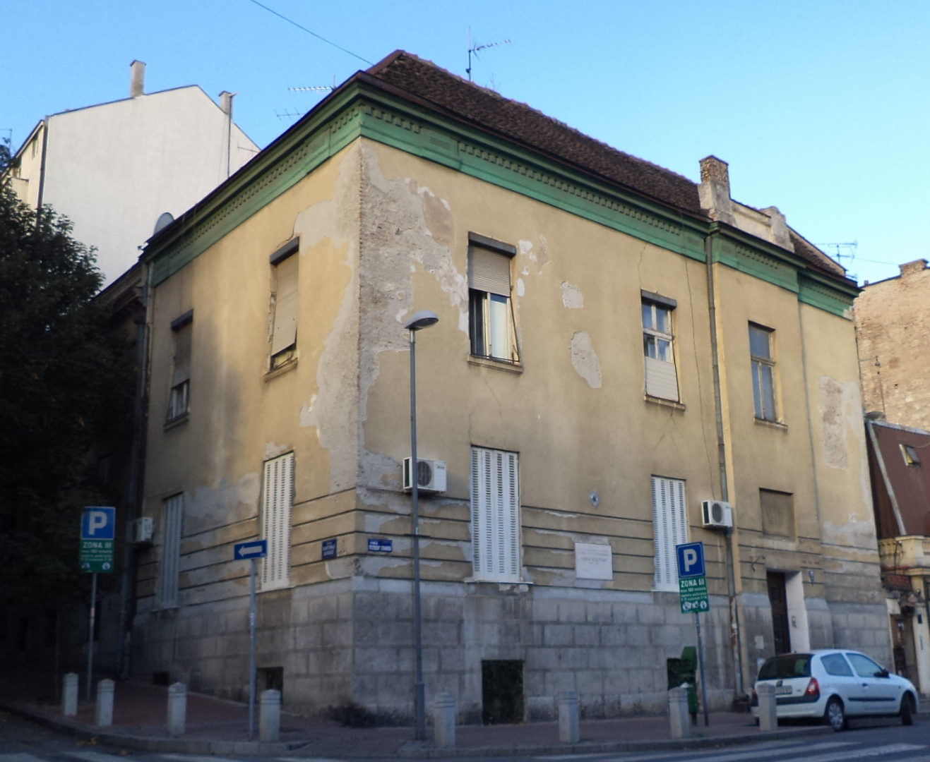 Кућа Јована Скерлића